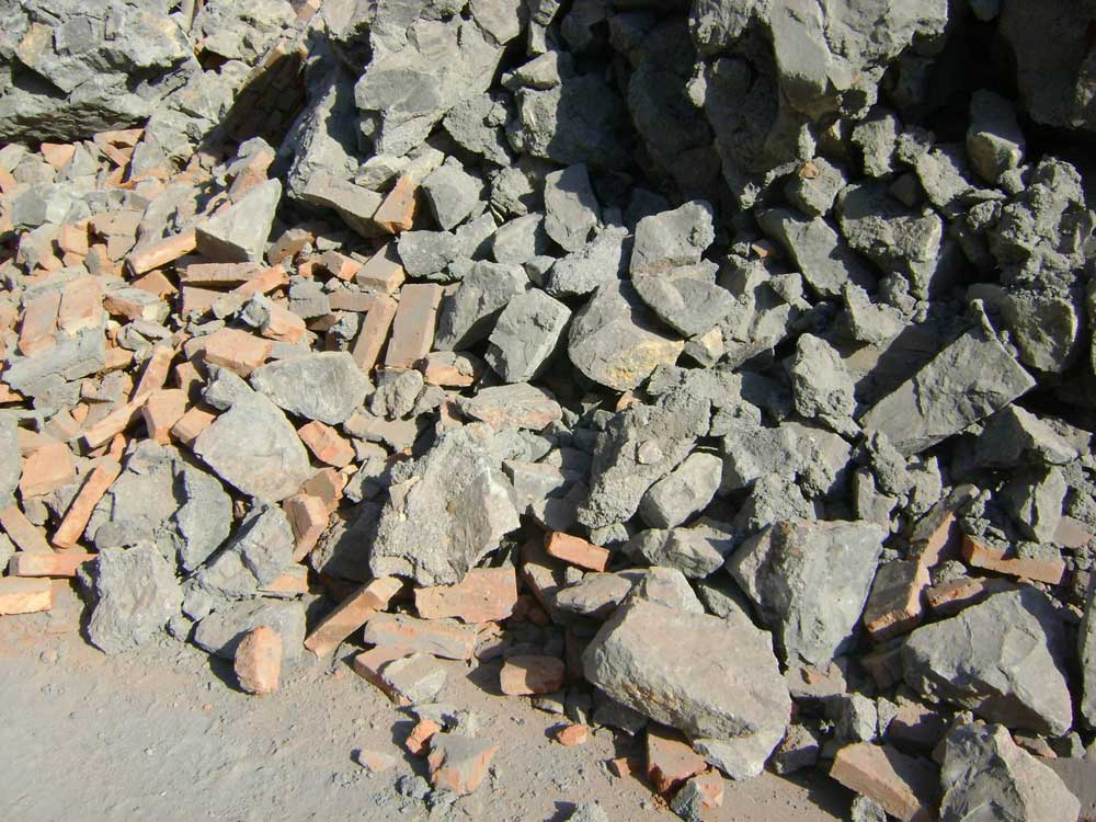 Escombro